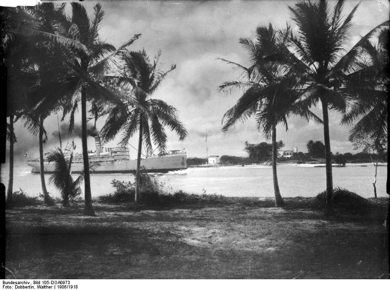 Hafeneinfahrt in Daressalam